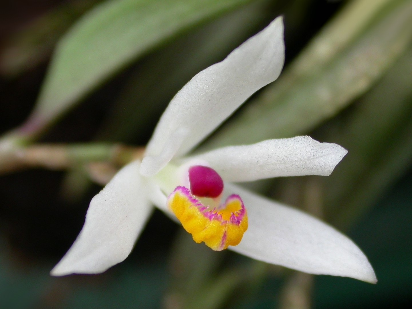 Photo